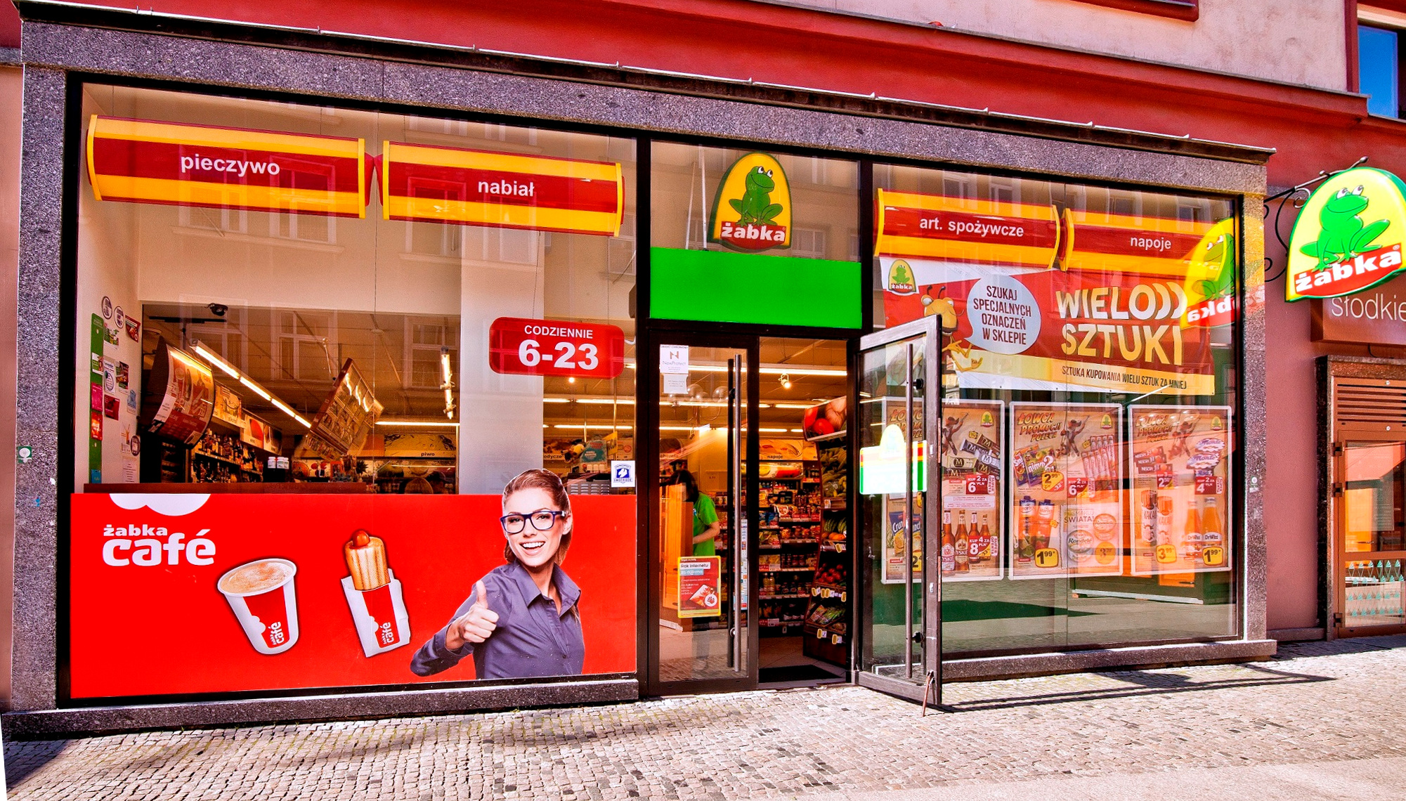 Sklep sieci Żabka we Wrocławiu